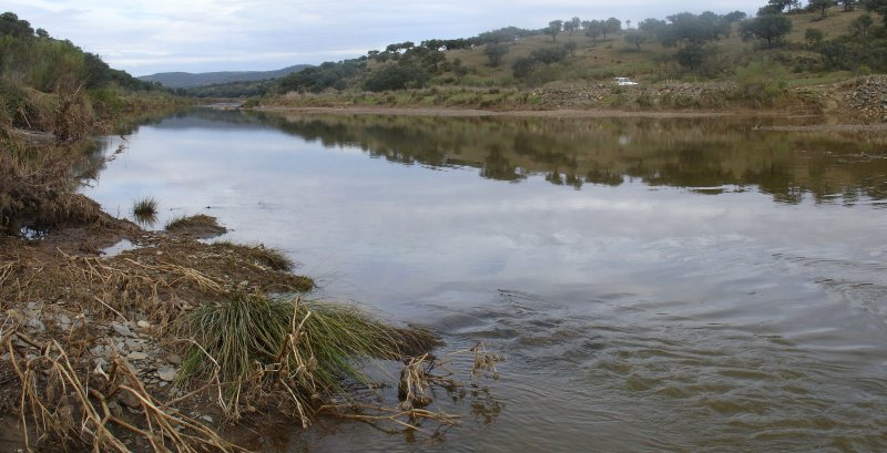 río Bembezar